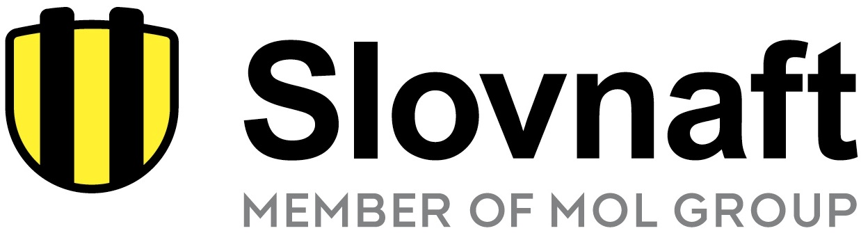 Логотип компании "Словнафт"